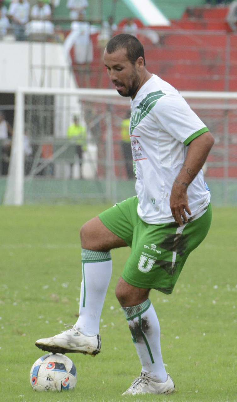 Cristian Fabbiani jugando en Liga de Portoviejo de Ecuador en 2016